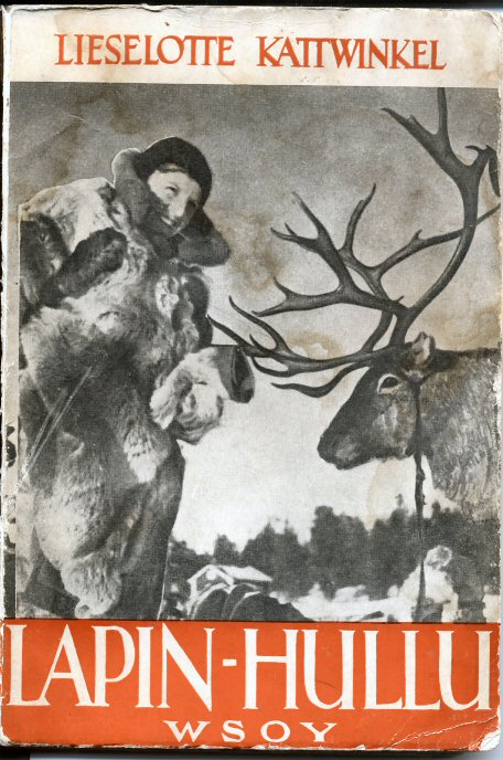 La autora posa con un reno en 1939 durante la Guerra de Invierno en Finlandia